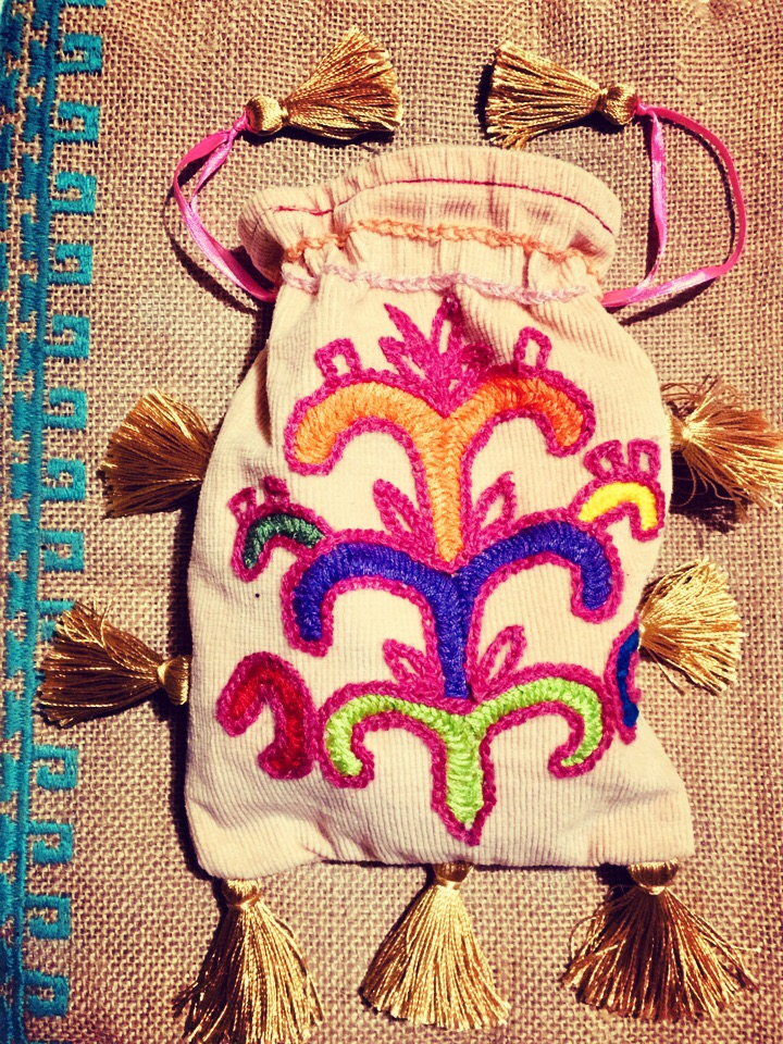 Кисет. Янсыҡ с башкирской вышивкой "Ҡусҡар"